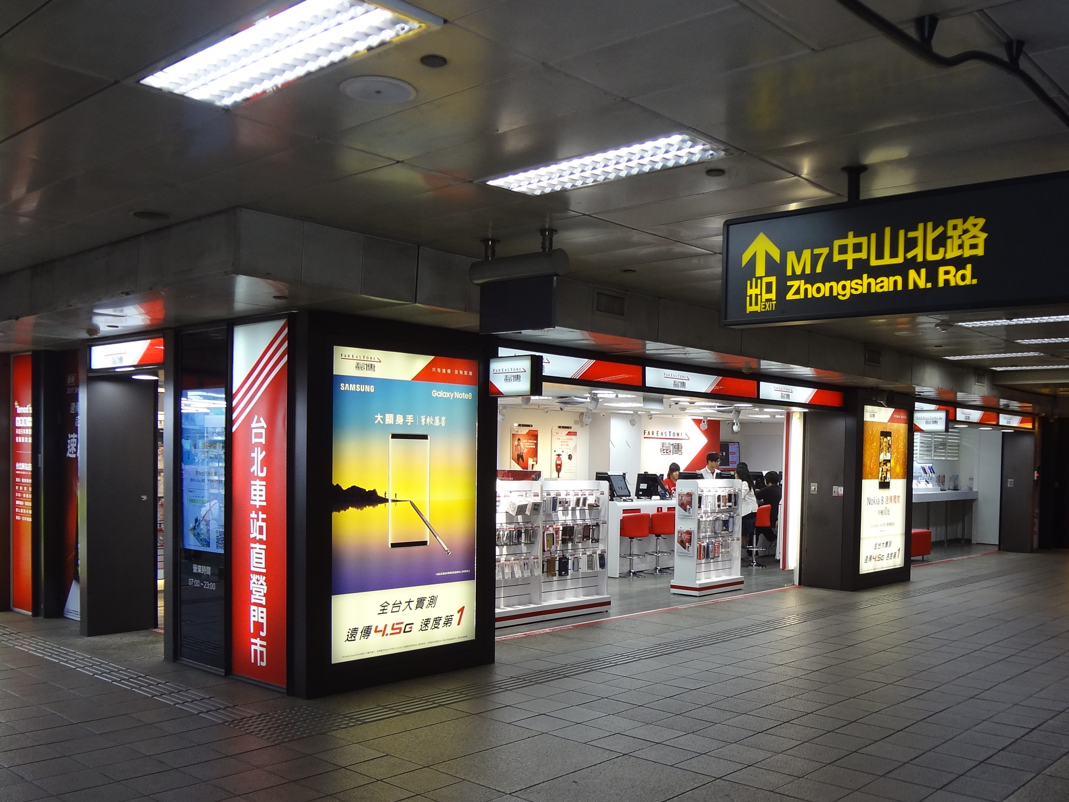 中文（台灣）: 誠品站前店遠傳電信台北車站直營門市，位於台北車站地下一樓M8出口附近。